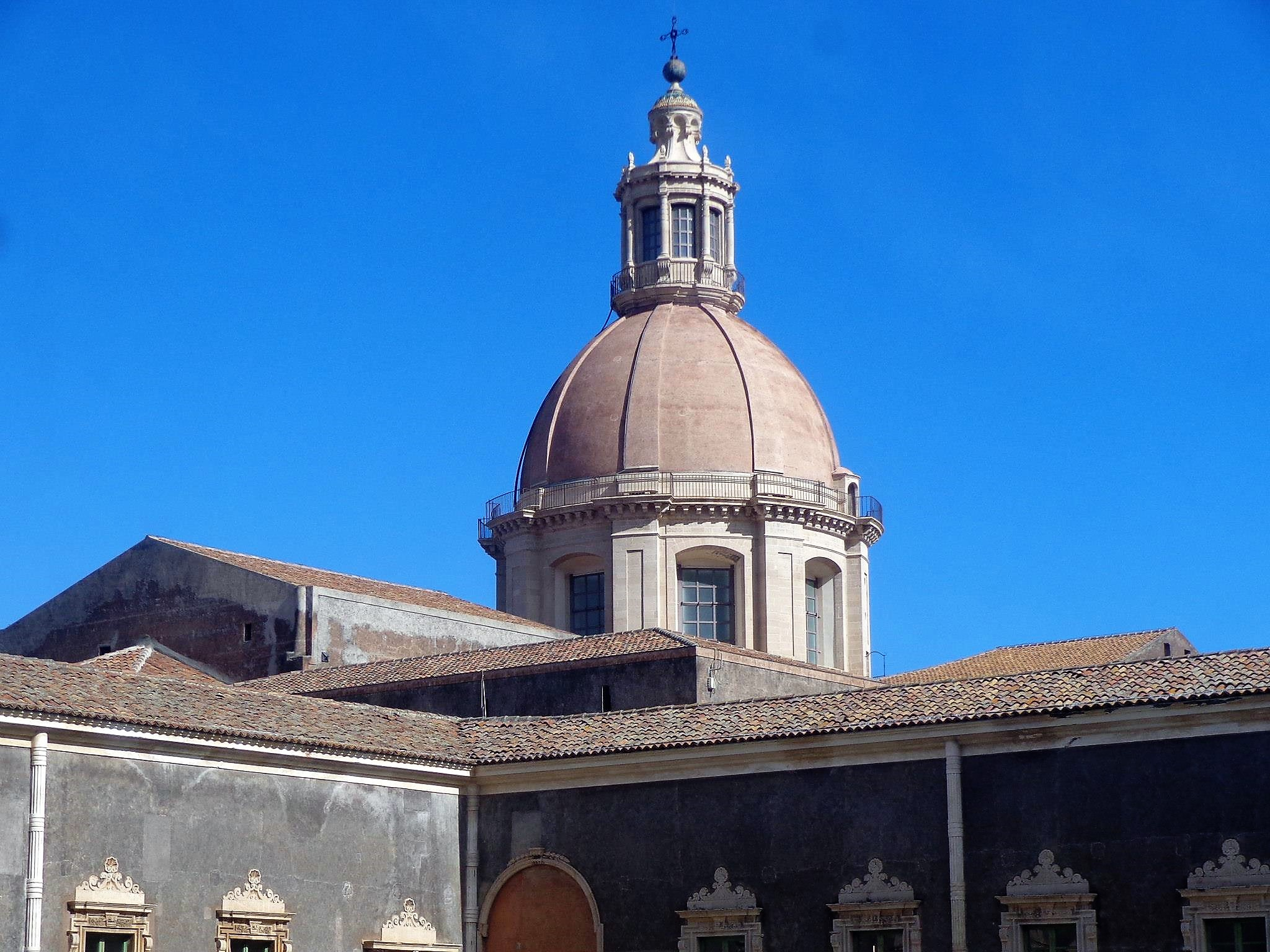 Cupola